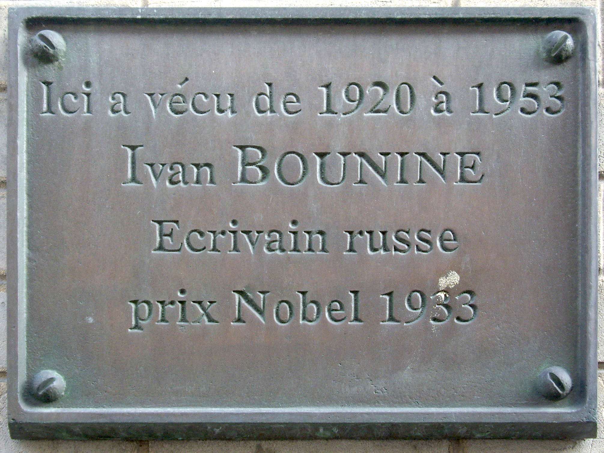 Plaque commémorative, 1 rue Jacques-Offenbach, Paris 16e. « Ici a vécu de 1920 à 1953 Ivan Bounine, écrivain russe, prix Nobel 1933. »